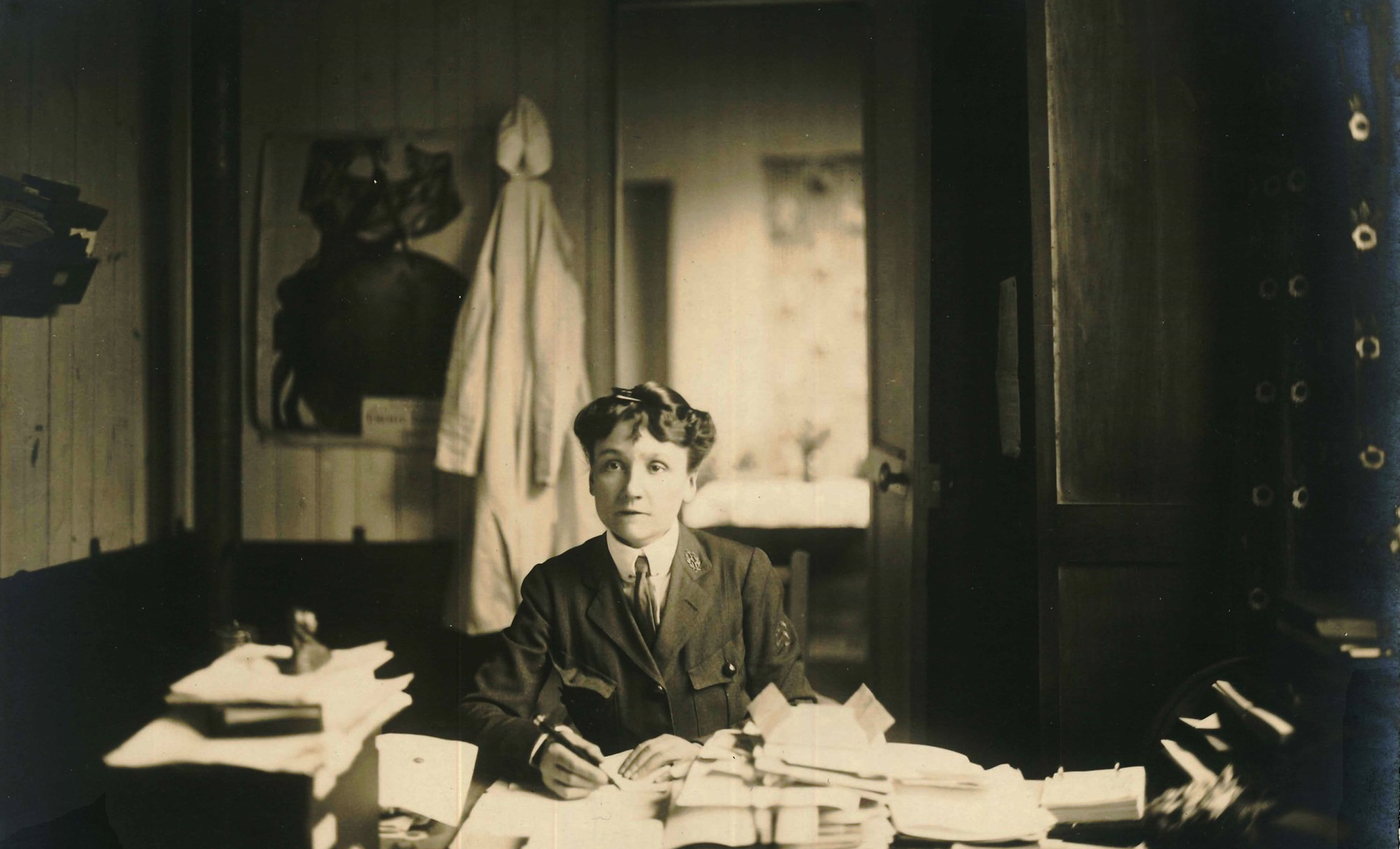 Dr Nicole Girard Mangin (1878-1919)